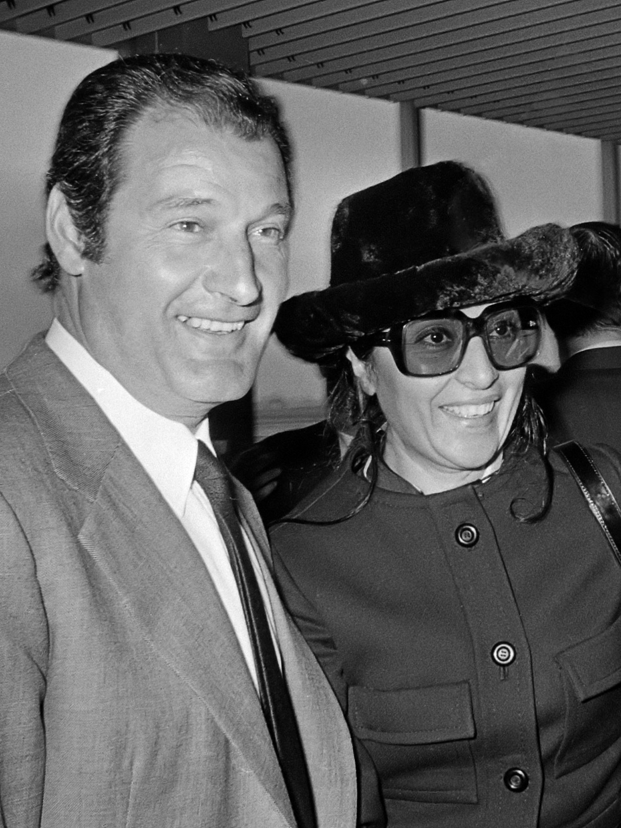 Aankomst op Schiphol van het elftal van Atletico Madrid voor de wedstrijd tegen Ajax; Atletico Madrid-trainer Domingo en zijn echtgenote